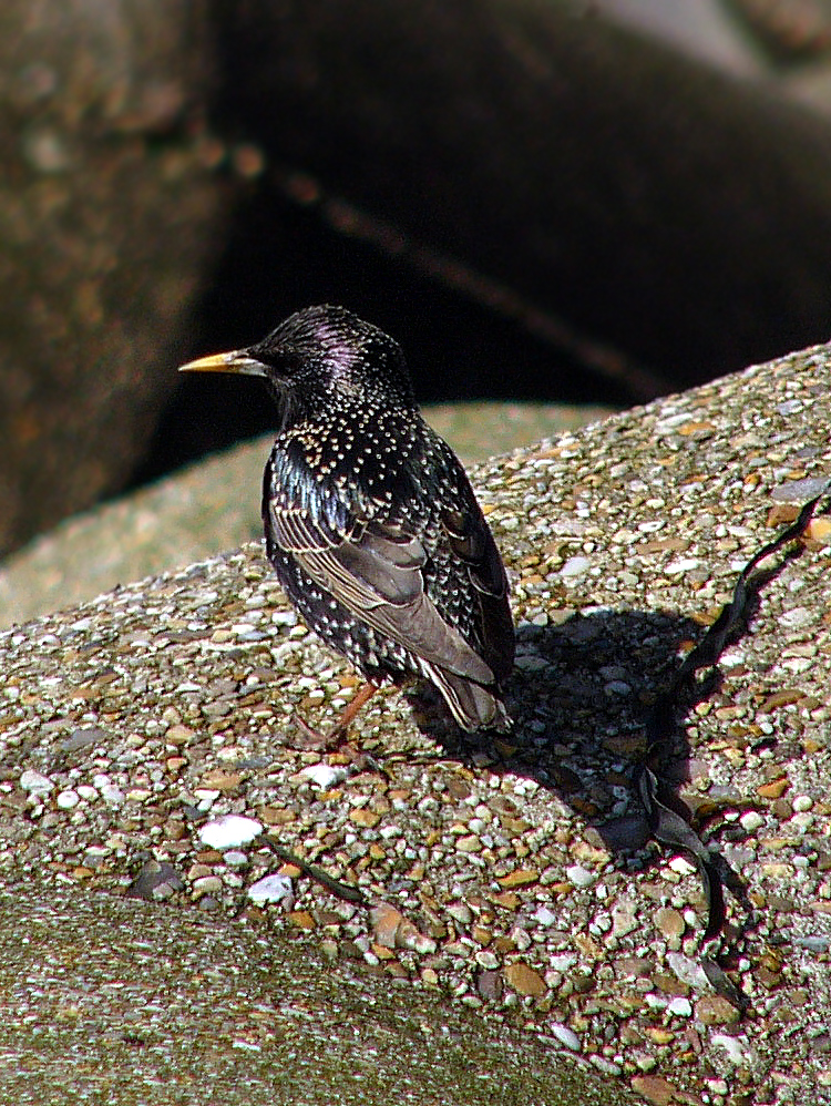 Sturnus vulgaris